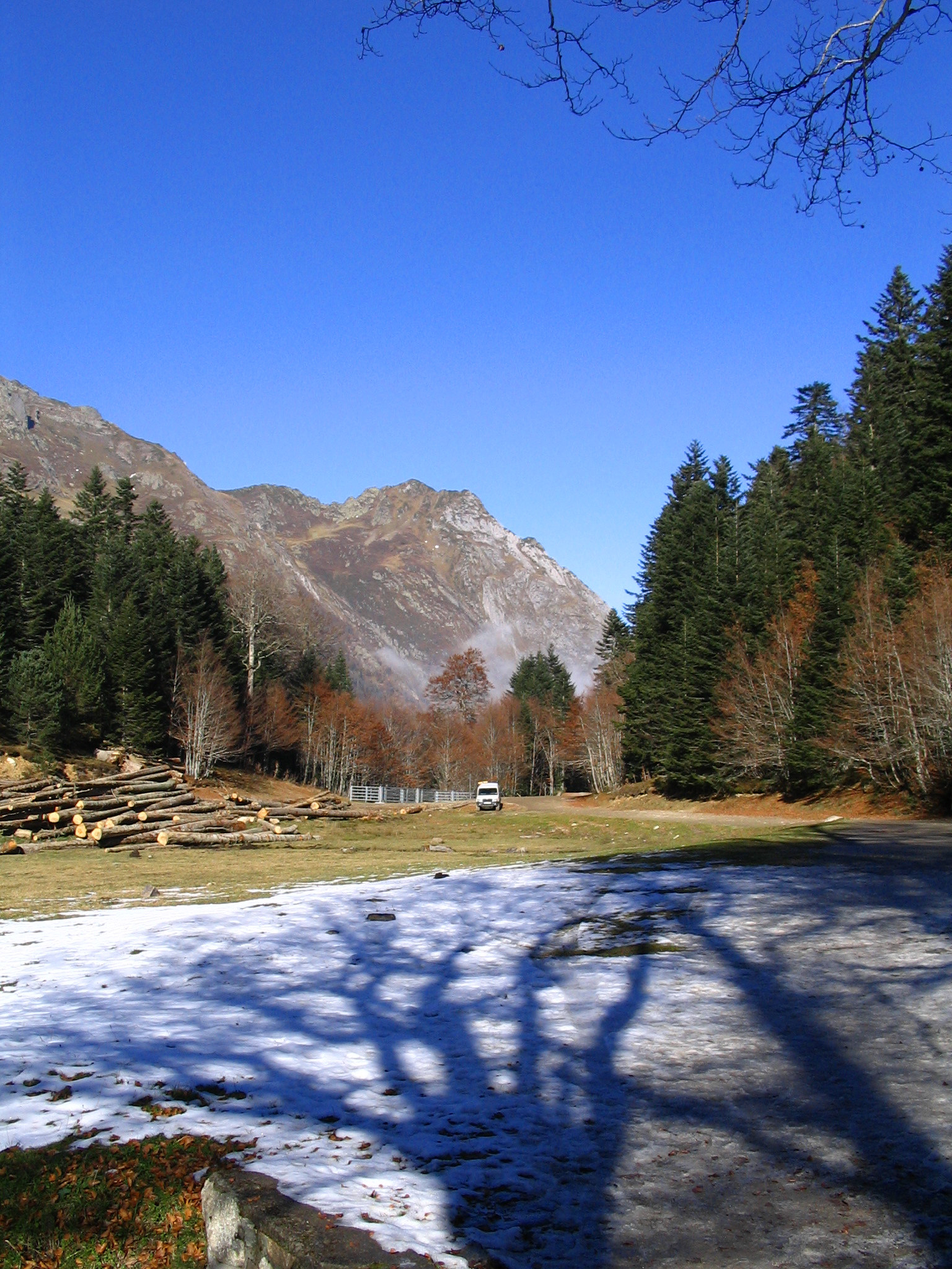 Lac de Bious-artigues - Pyrenées atlantiques - France